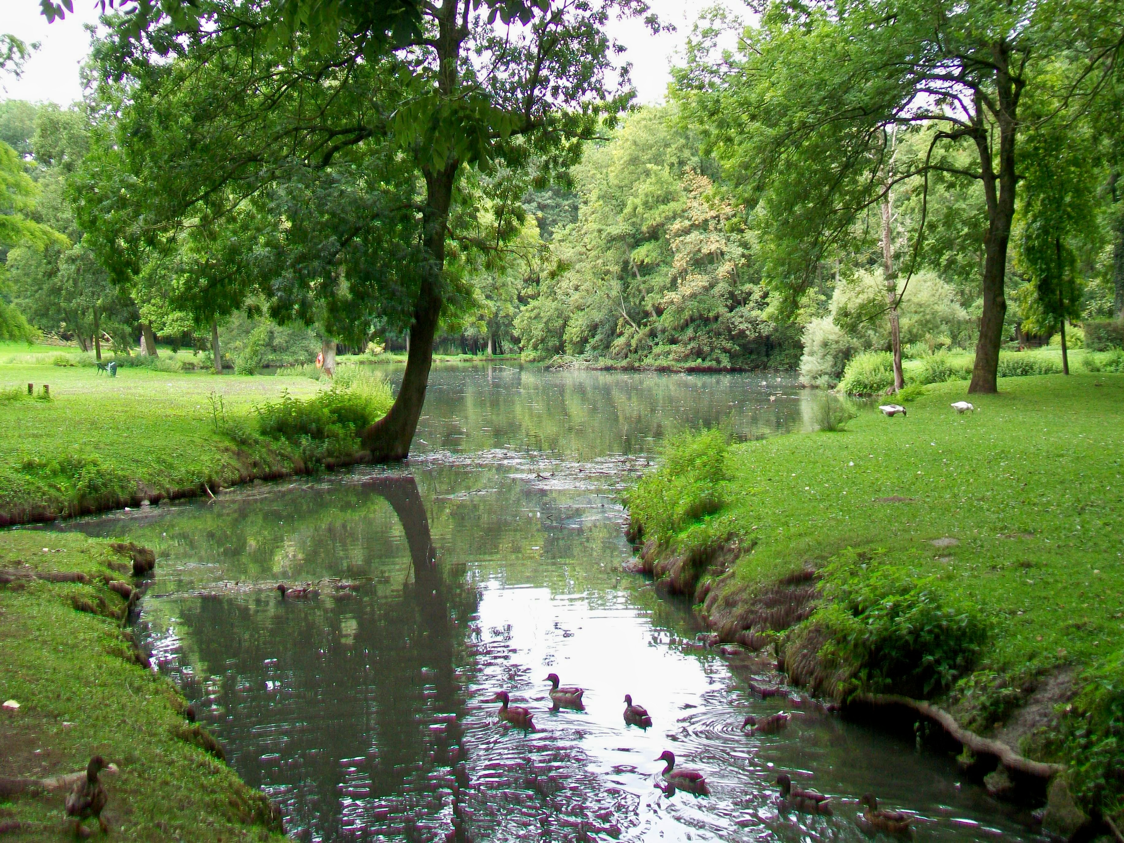 L'un des étangs au fond de la vallée.